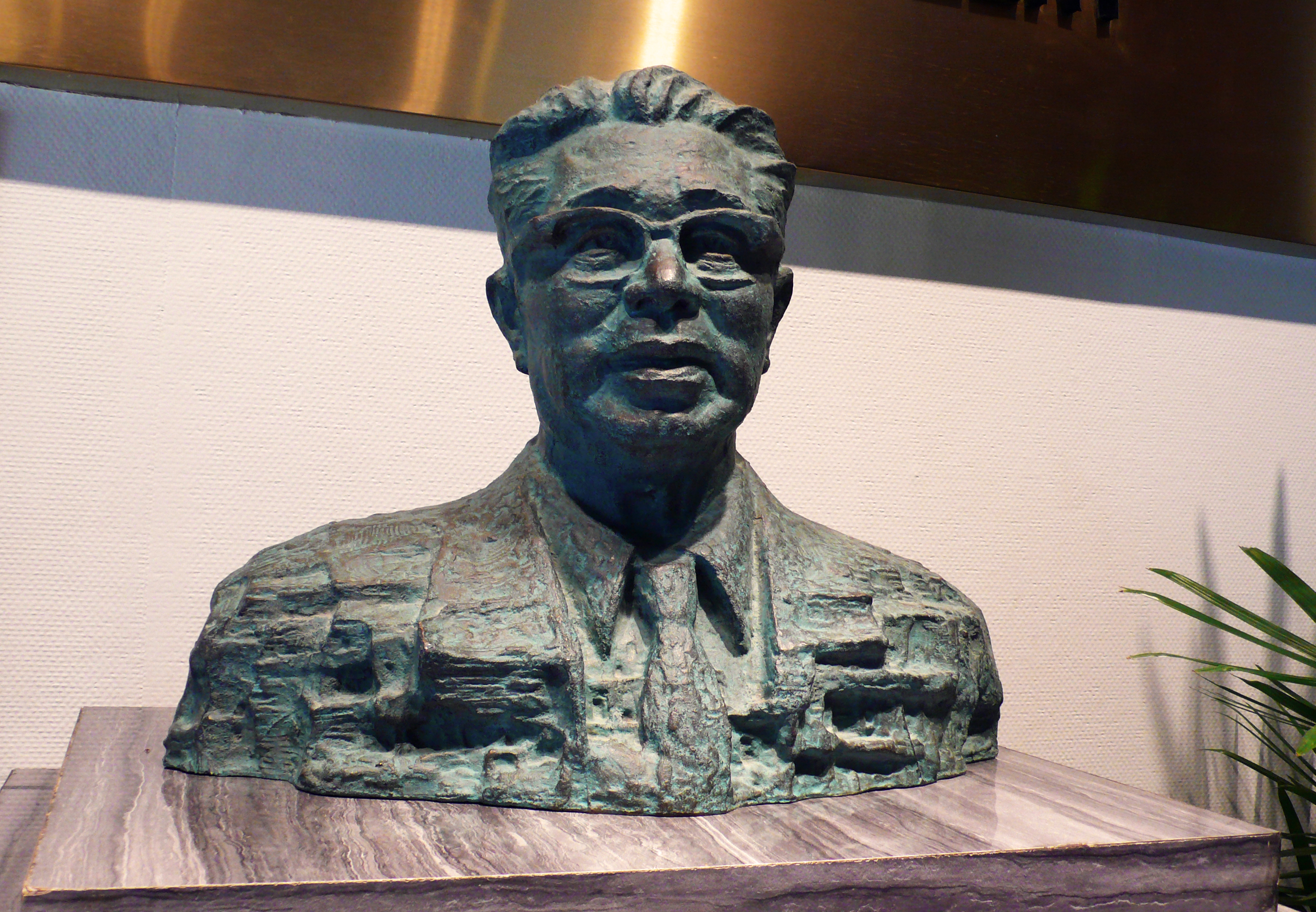 常书鸿青铜像，位于浙江省博物馆常书鸿美术馆。